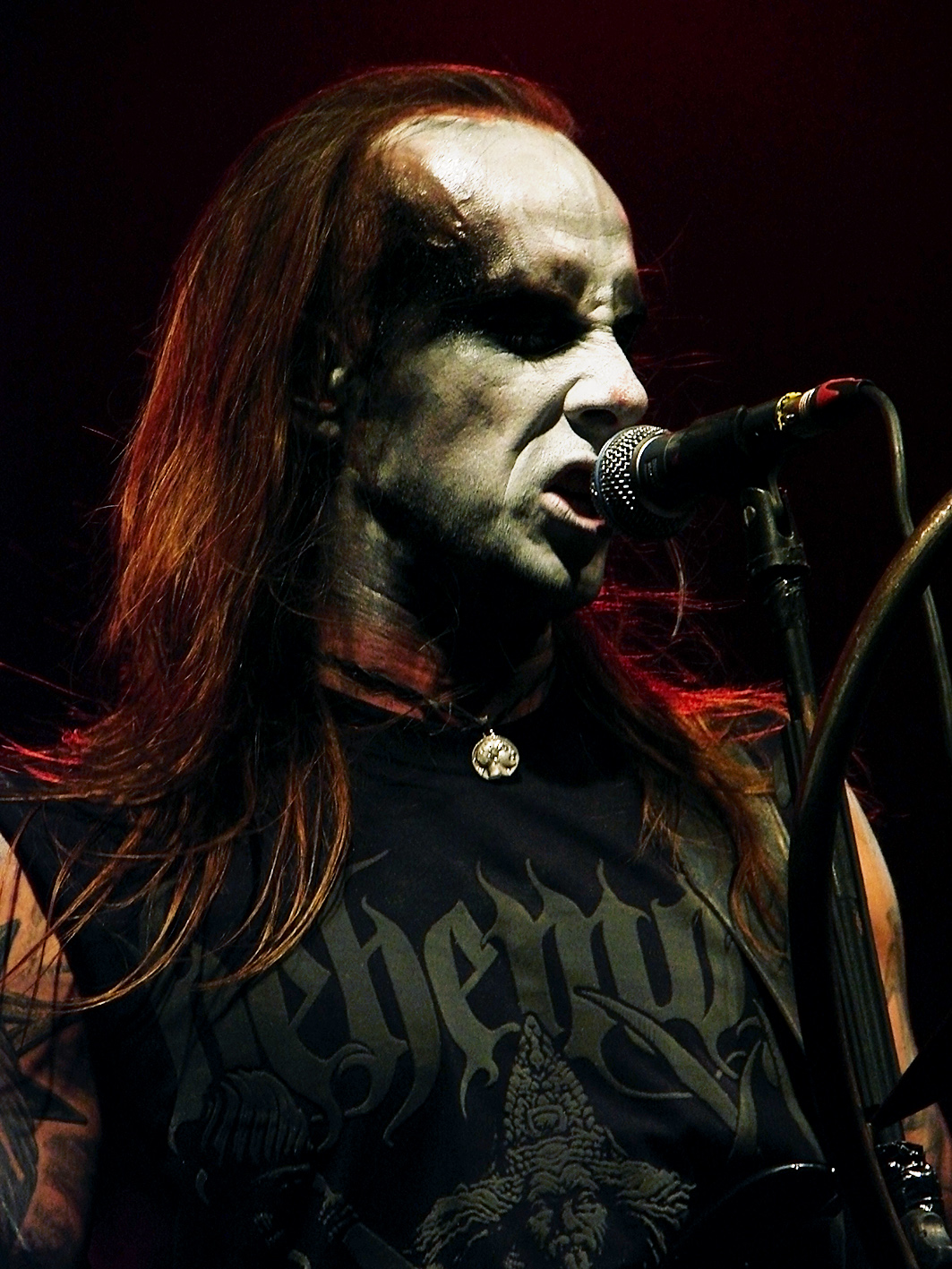 Behemoth en concert à Colfontaine (Belgique), le 07/03/2009: Nergal (Adam Darski).